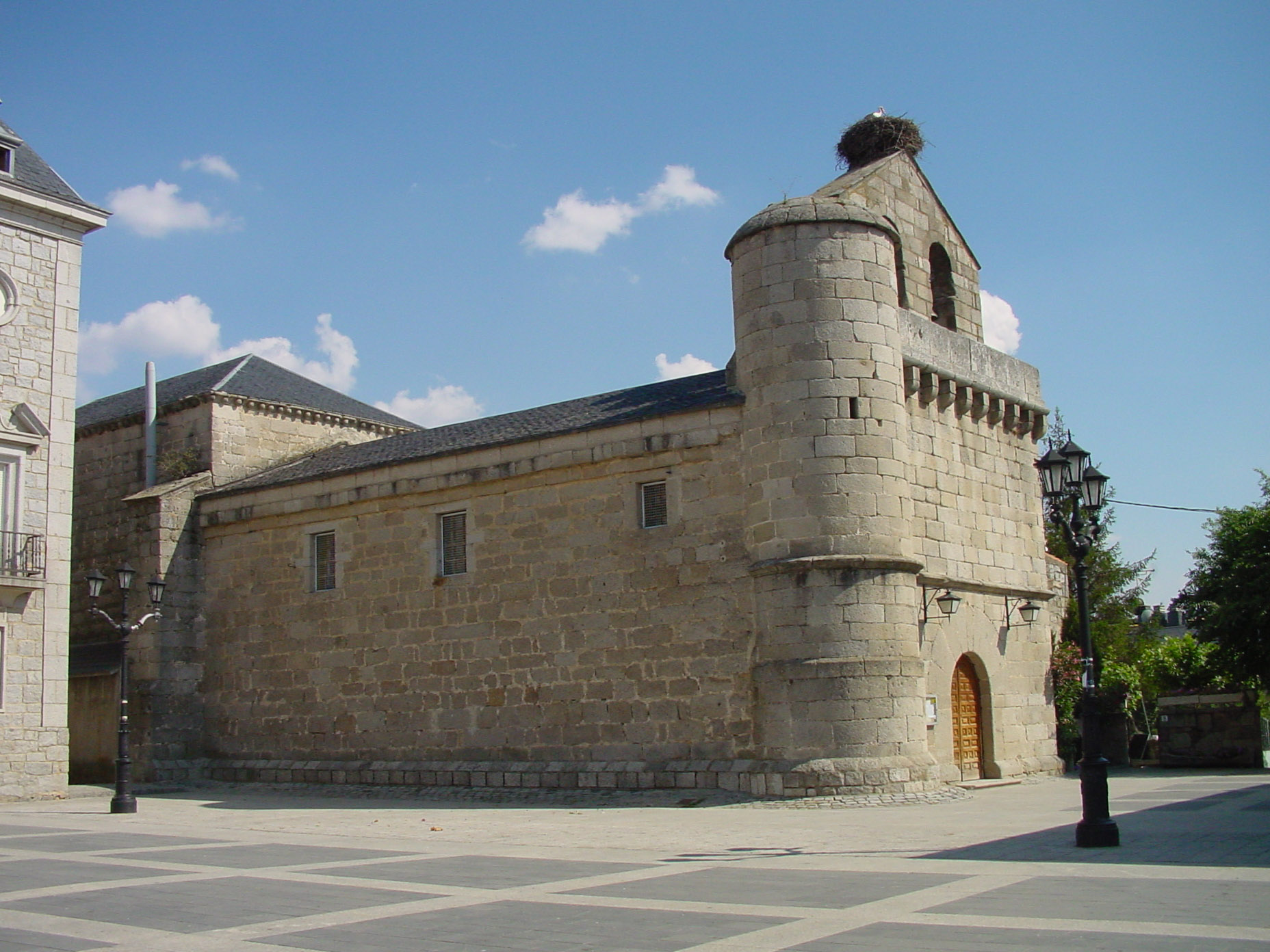 Iglesia Parroquial de la Asunción de Alpedrete.